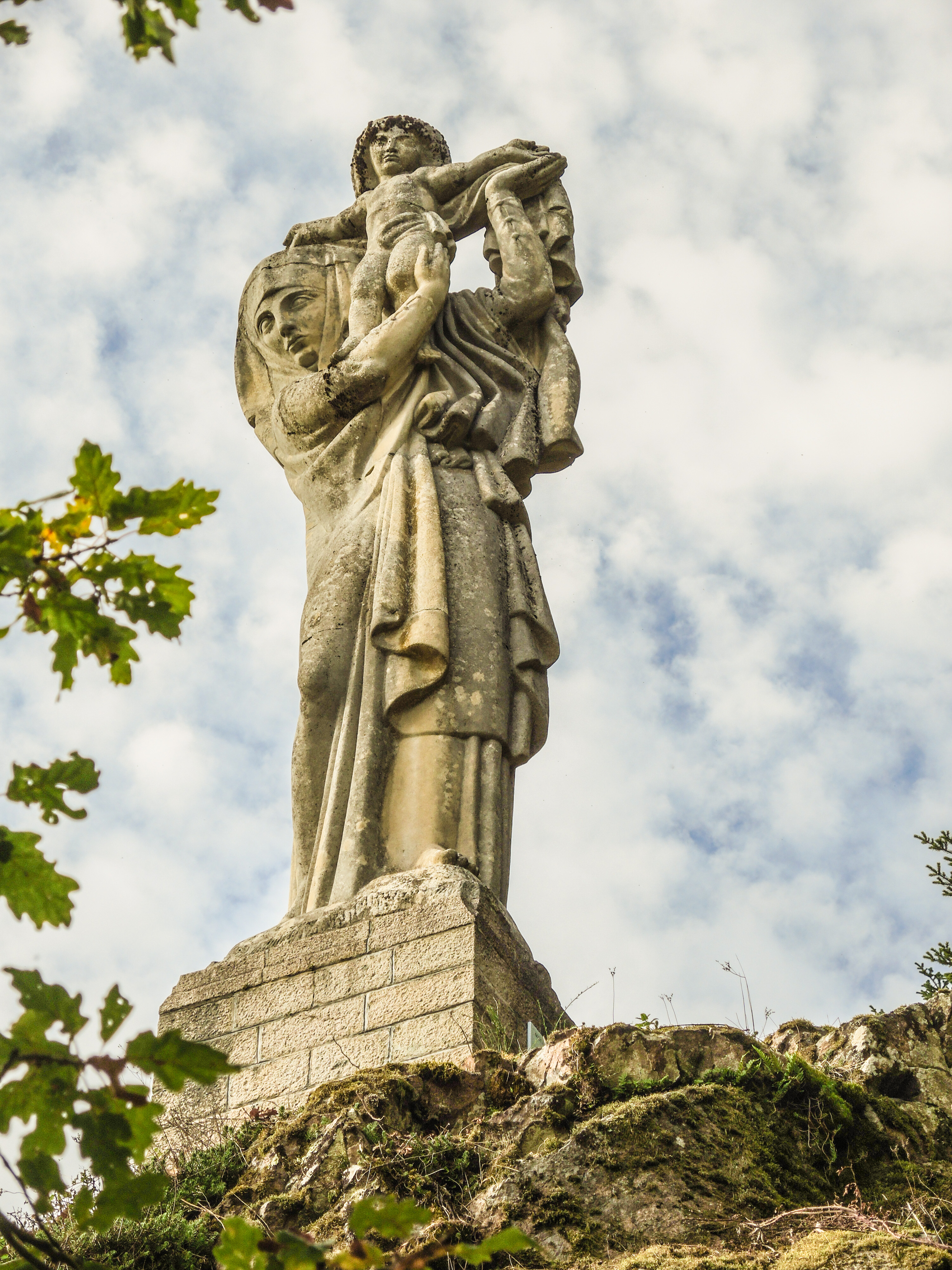 Statue de la Vierge d'Alsace. Niederbruck. Haut-Rhin.